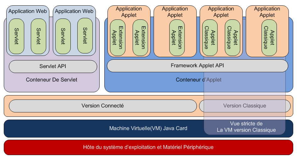 Architecture Java card Platform V3